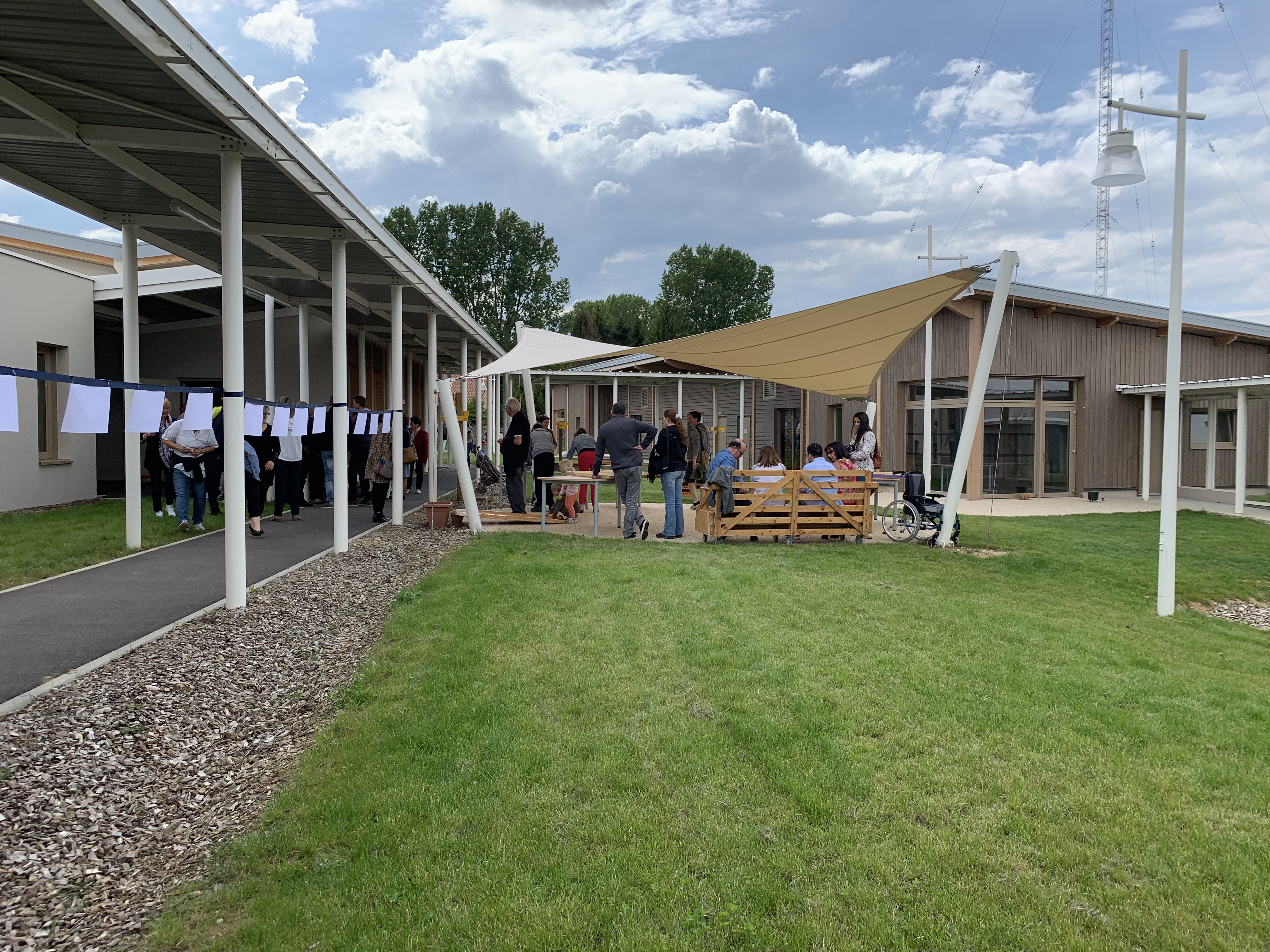 Les Passerelles de la Dombes, Tramoyes (mai 2019).